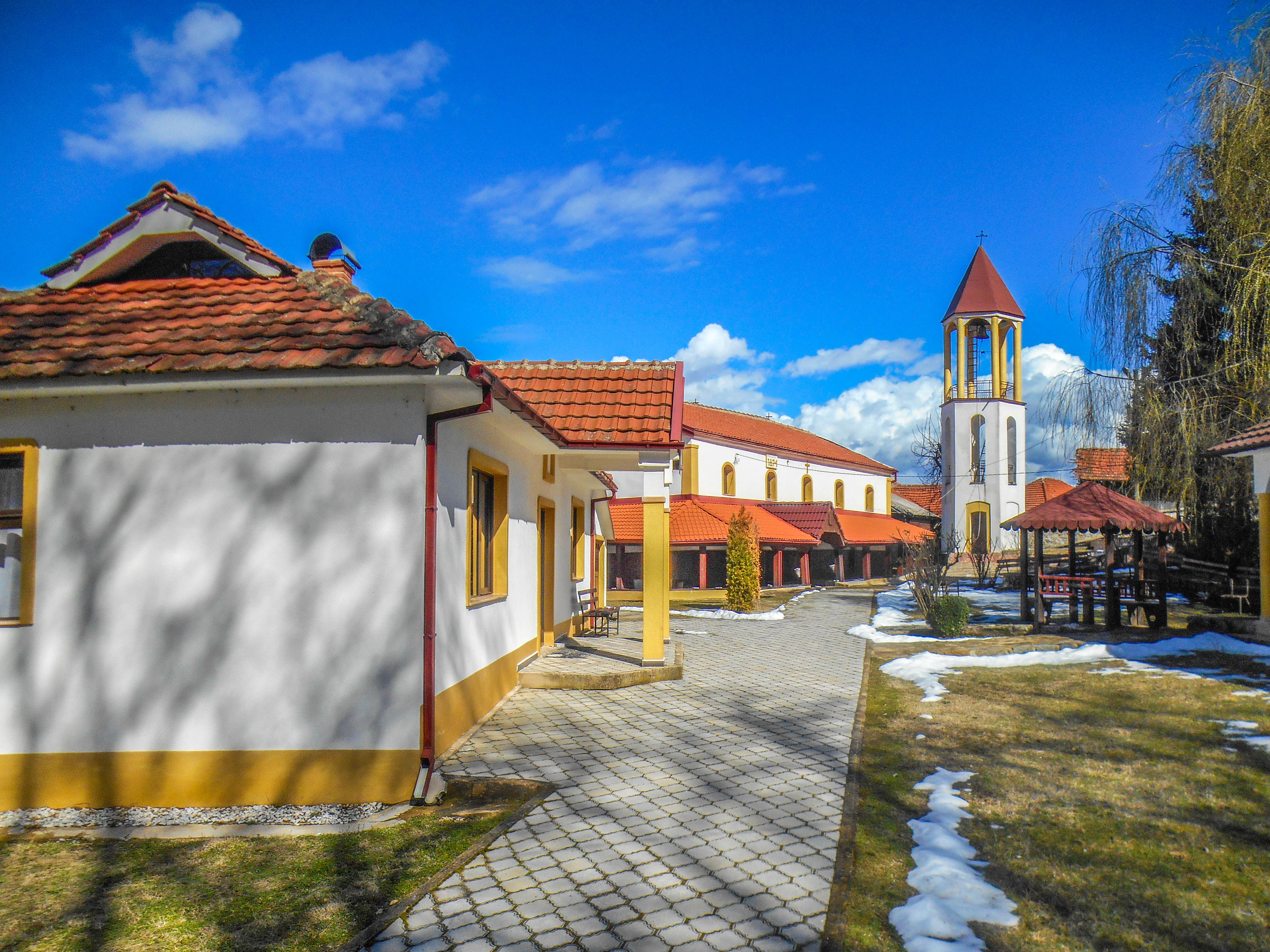 Црква „Св. Пантелејмон“ - Мокриево